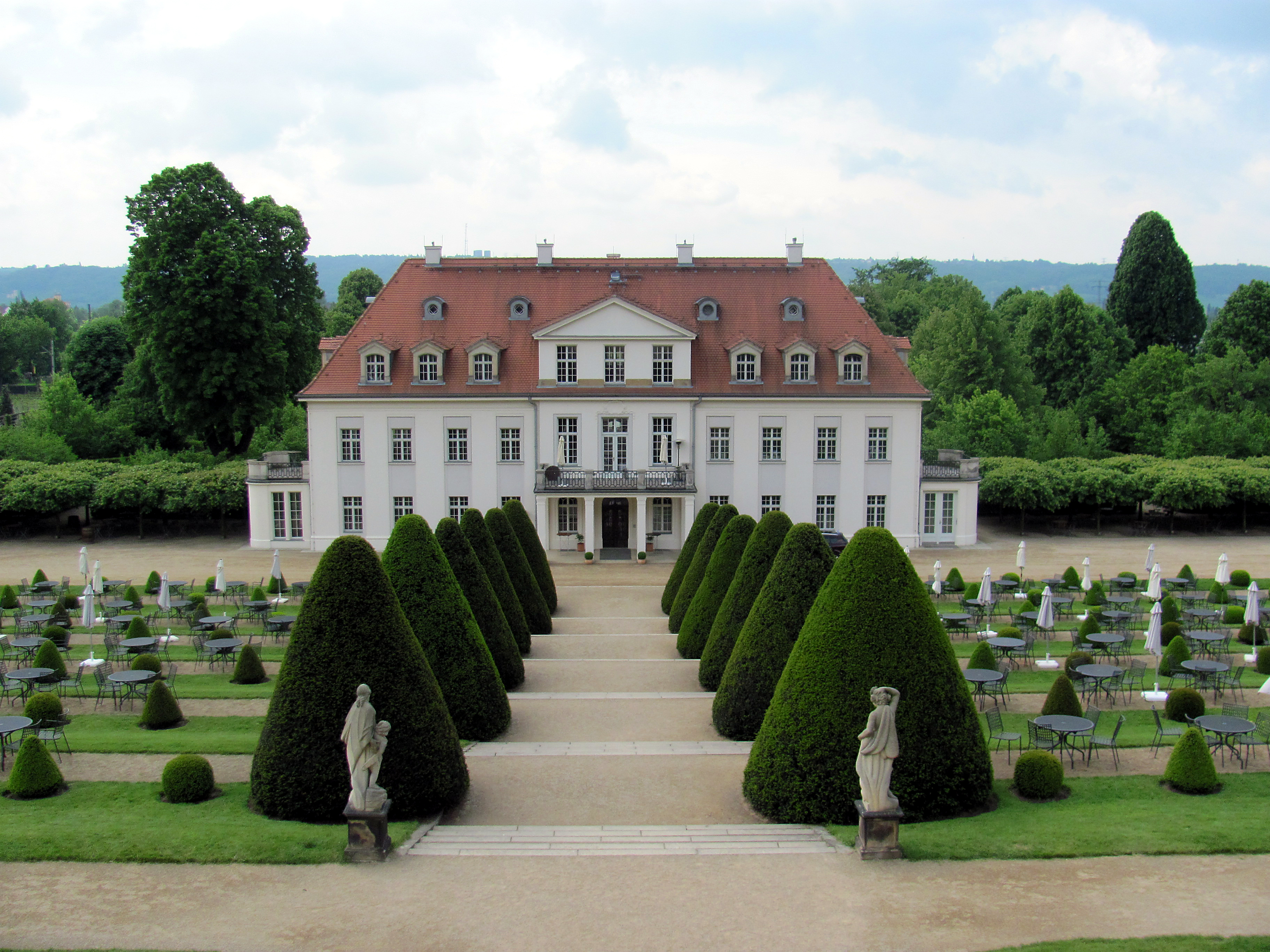 Radebeul, Schloss Wackerbarth, Blick auf die Bergseite des Schlosses